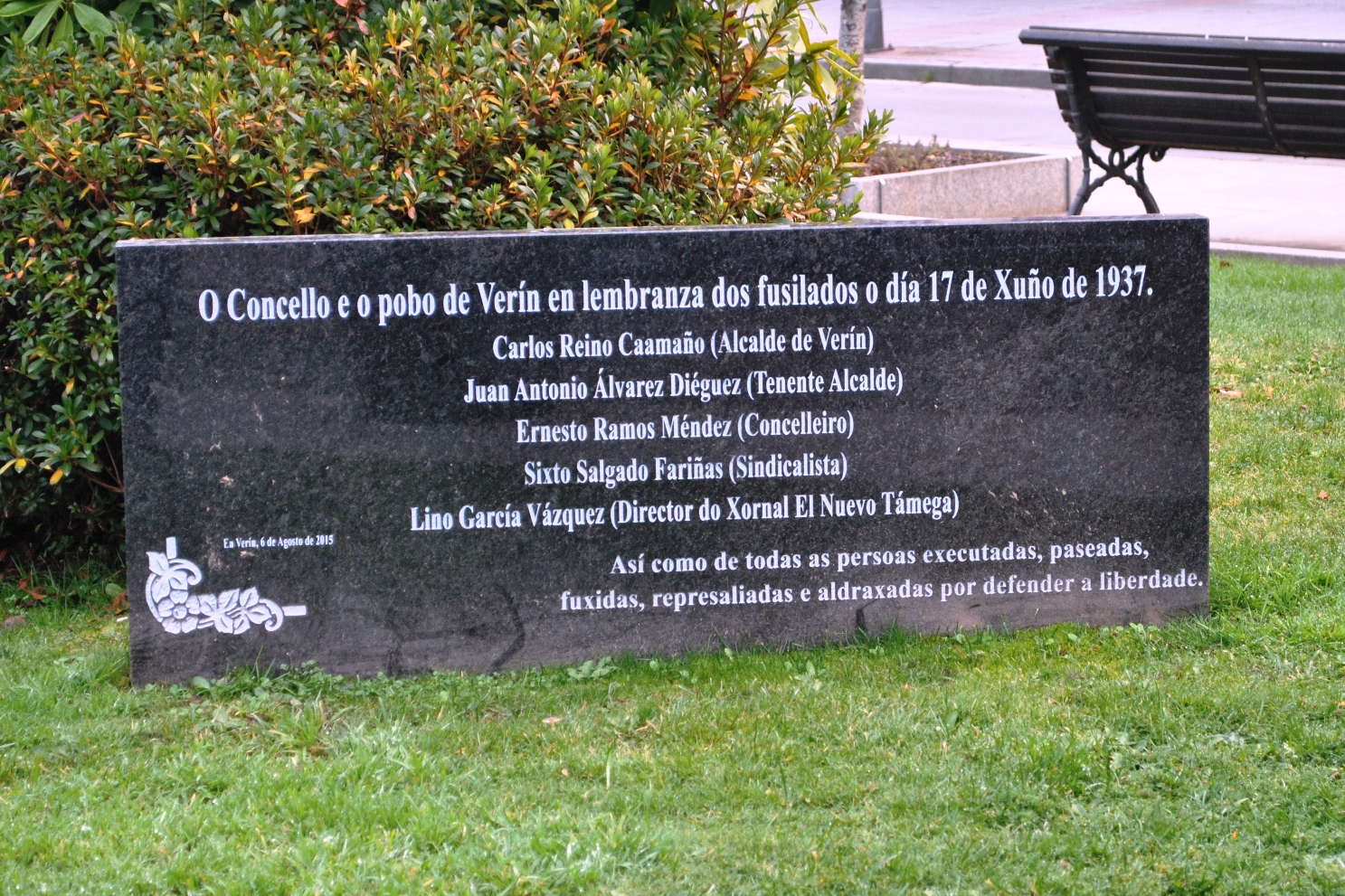 O pobo de Verín en lembranza dos fusilados o día 17 de xuño de 1937.JPG